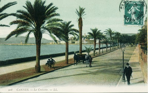 Cannes La Croisette